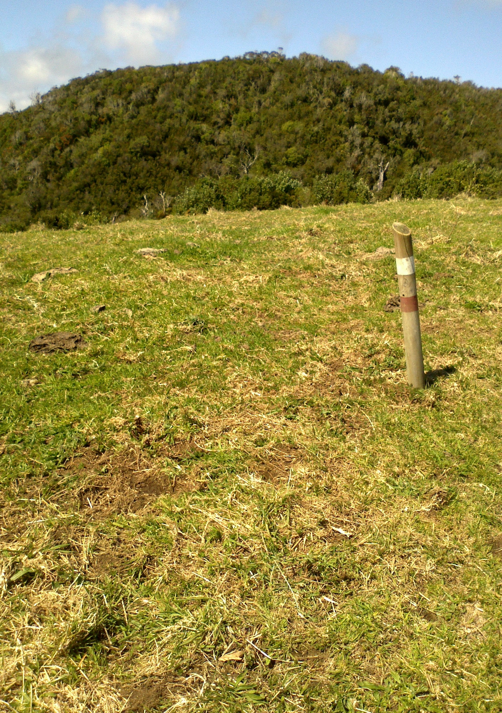 Poste indicador de la ruta del Sendero de Chile entre Dubatao y Aulen, en la costa occidental de Chiloé, comuna de Ancud, Chile.